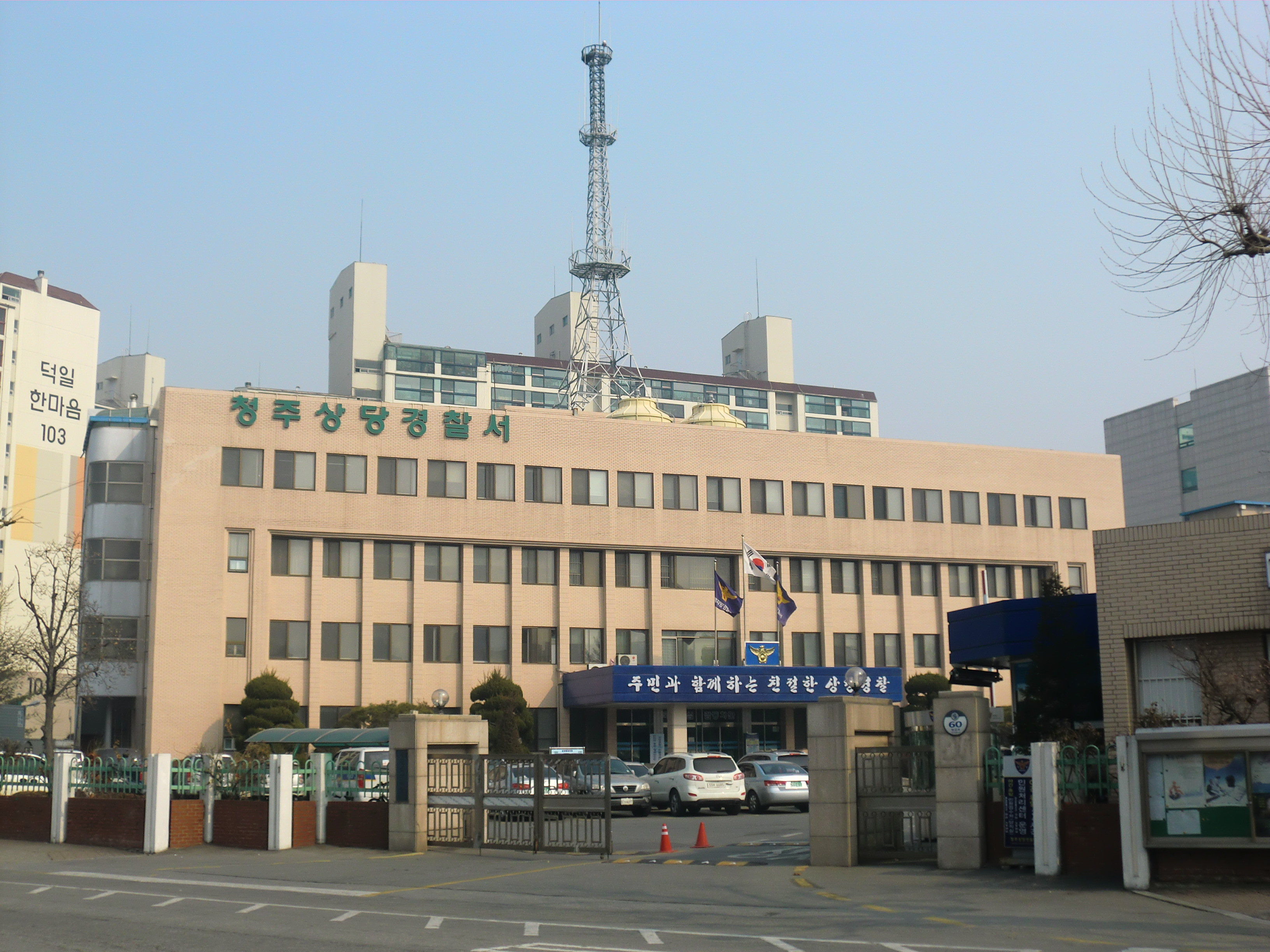 충청북도 청주시 상당구에 있는 청주상당경찰서(2014년6월30일까지)